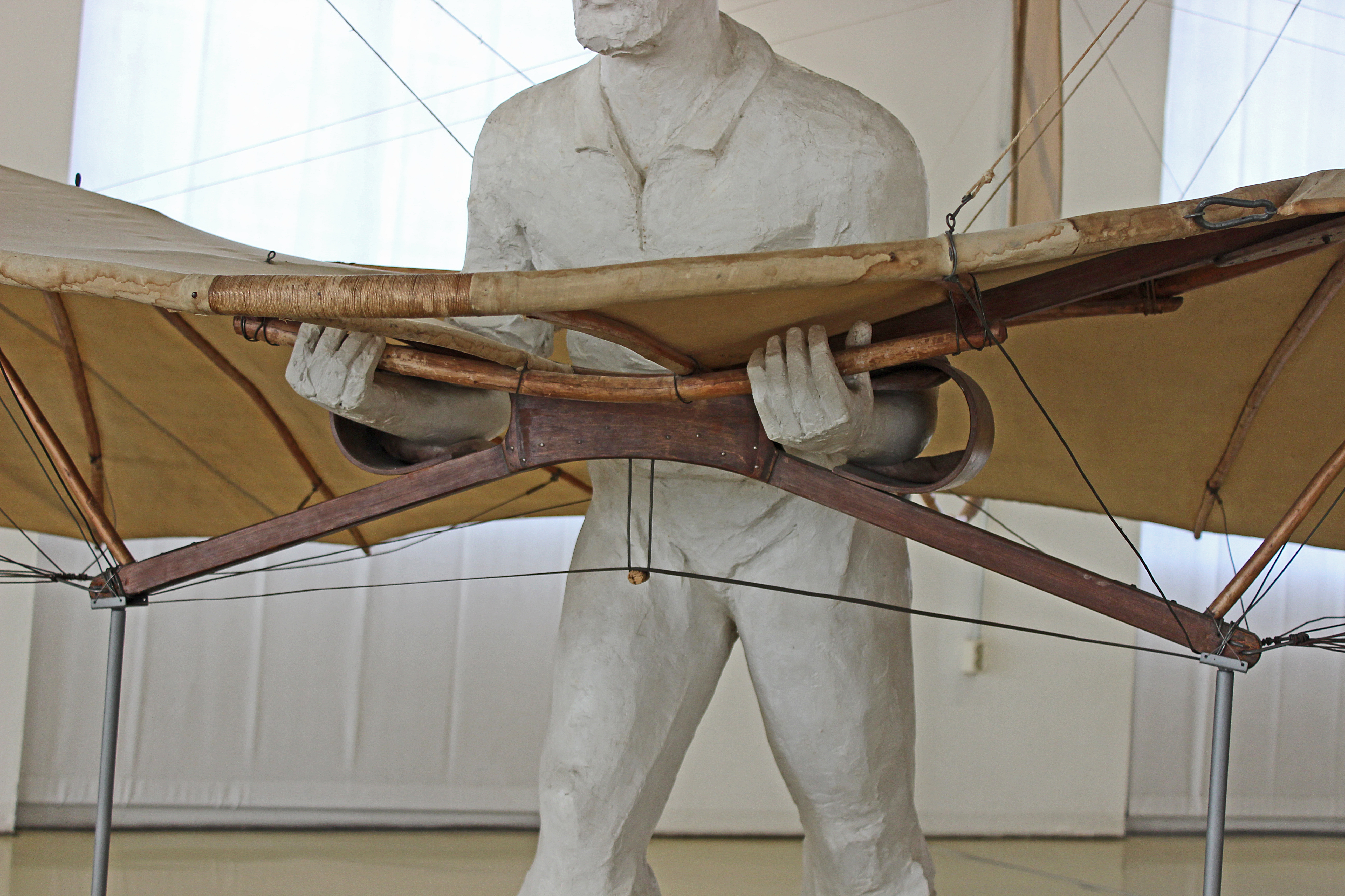 Detail des Normalsegelapparats. Das Holmkreuz, das zur Befestigung der Tragflächenrippen, zur Verspannung und zur Aufnahme des Apparats durch den Piloten mit seinen Unterarmen dient. Exponat in der Flugwerft Schleißheim